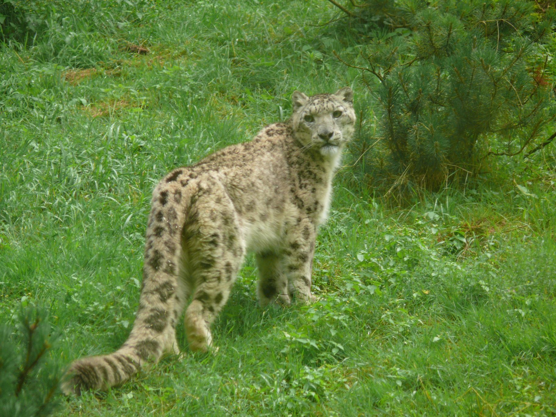 Schneeleopard (Uncia uncia)